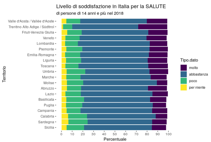 File realizzato con RStudio con dati Istat